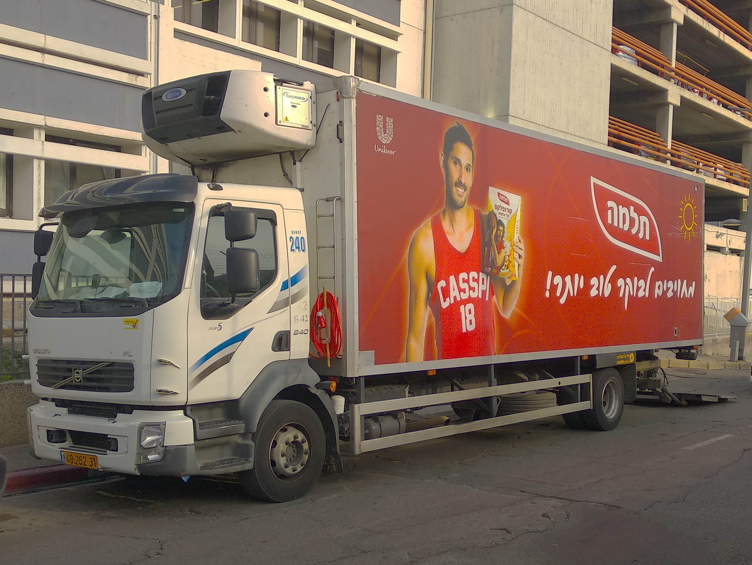 משאית של תלמה